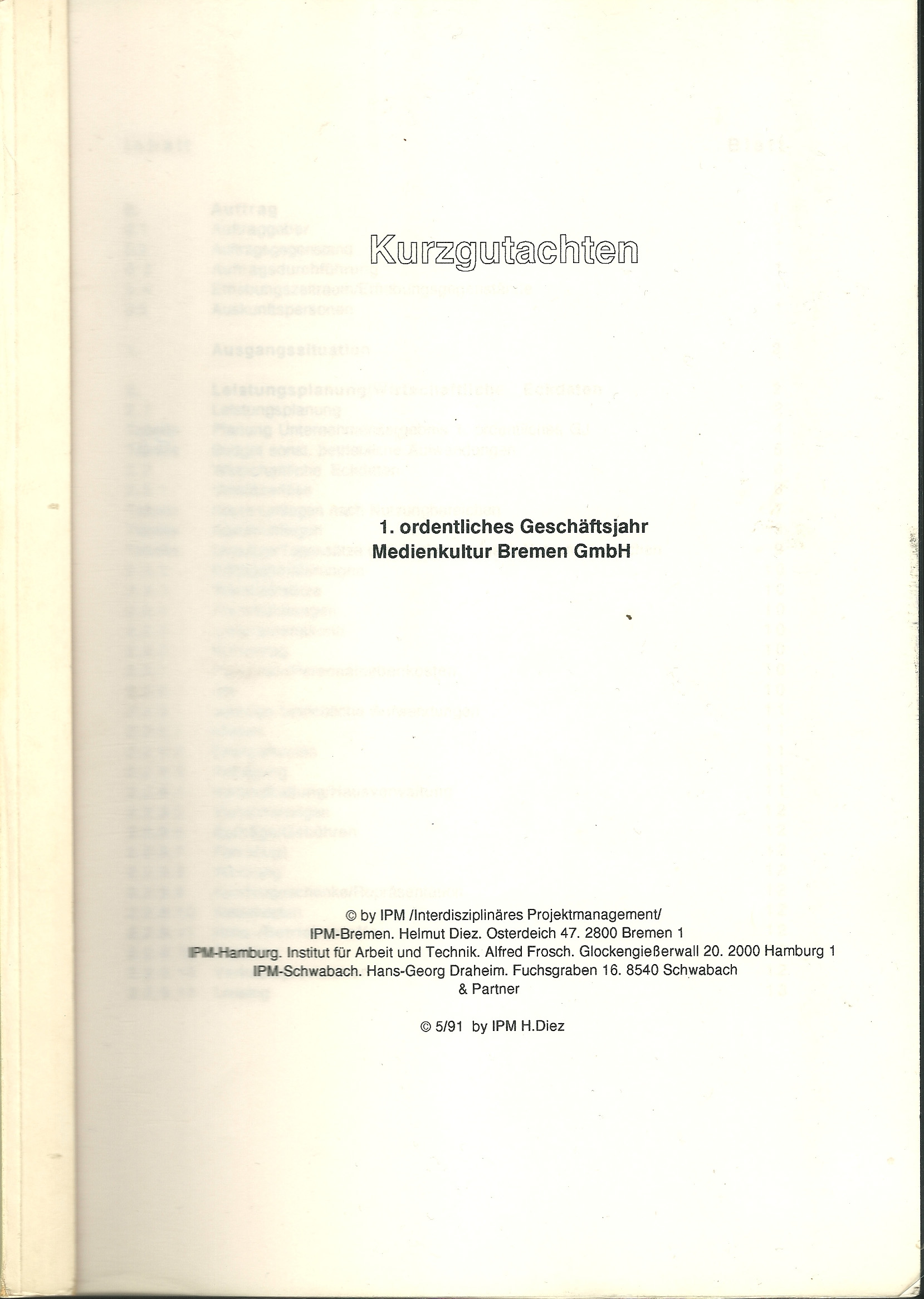 Gutachten von Helmut Diez für Kino 46